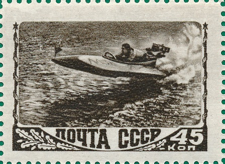 Серия «Спорт в СССР» (II выпуск года): Водно-моторный спорт, скутер, тёмно-коричневая. Глубокая печать на бумаге, без водяного знака, растр ГР, перфорирована: линейная зубцовка 12½ (на каждые 2 сантиметра края марки приходится 12½ зубцов). В марочных листах 100 (10×10) марок.